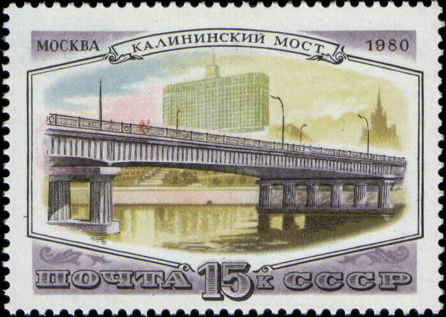 марка СССР